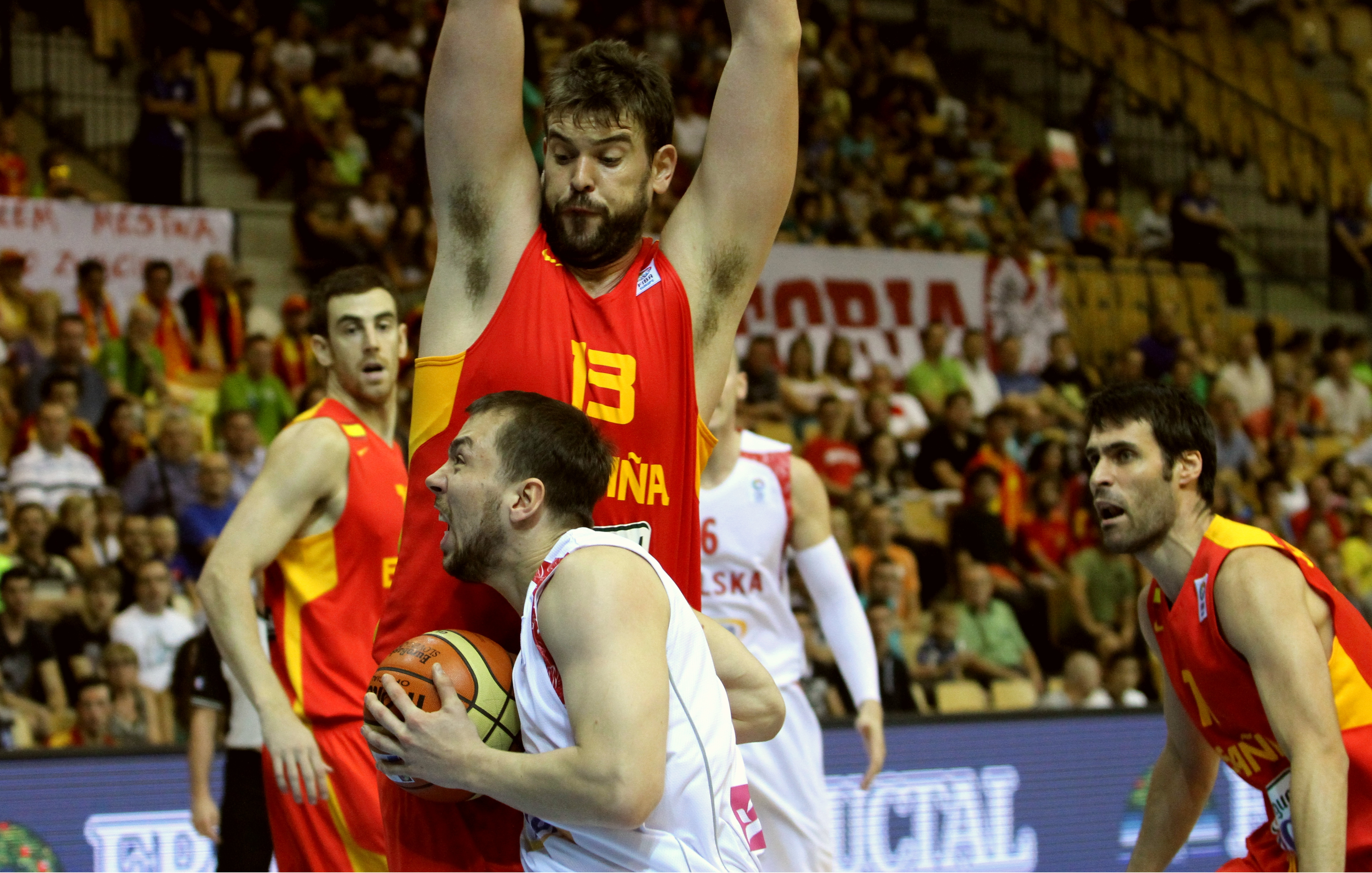 Reprezentacja Polski koszykarzy z 2013 roku. Michał Chyliński